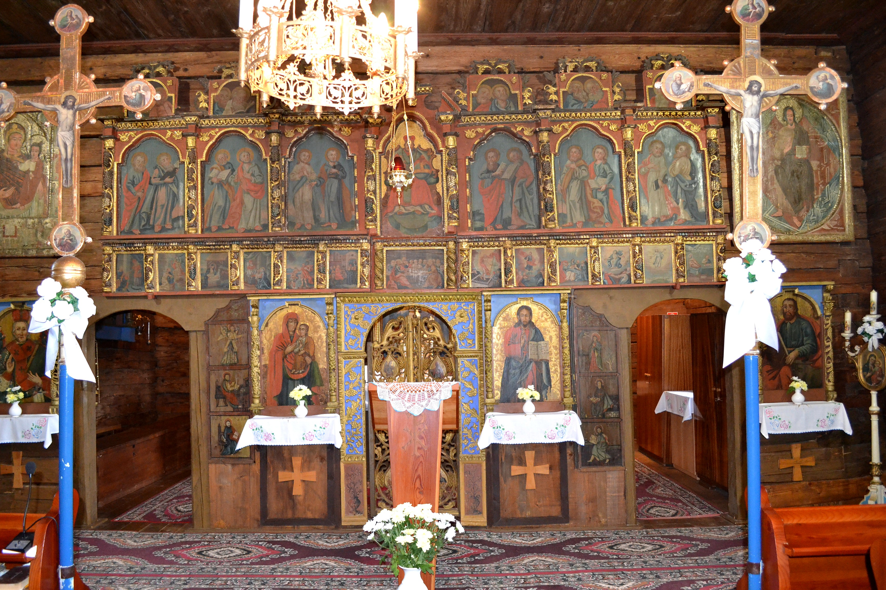 Vzácny ikonostas je tvorený ikonami z rôznych časových období. Najvzácnejšími sú ikony Bohorodička Hodegétria a Kristus Pantokrator po stranách vyrezávaných cárskych dverí